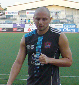 Darko Rakočević